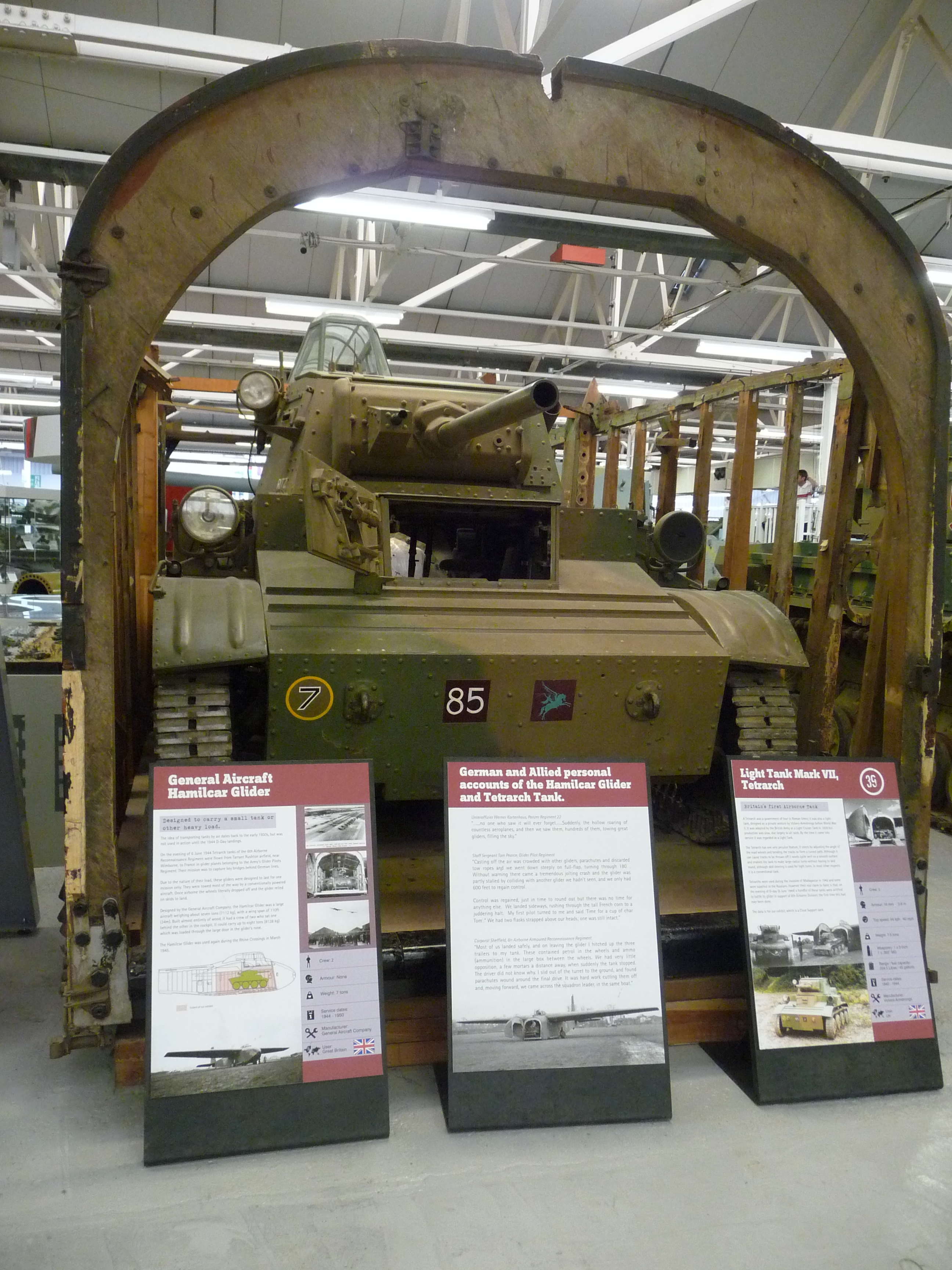 General Aircraft Hamilcar Glider